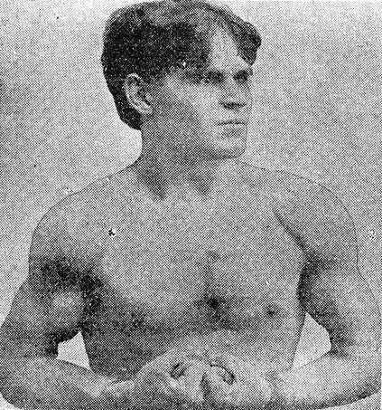 Andrés Balsa Antón, fotografía en Vida Gallega 1910